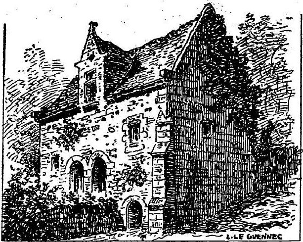 Guipavas : le moulin de Beaurepos en 1929 (dessin de Louis Le Guennec ; journal Ouest-Eclair n°10181 du 12 septembre 1929)